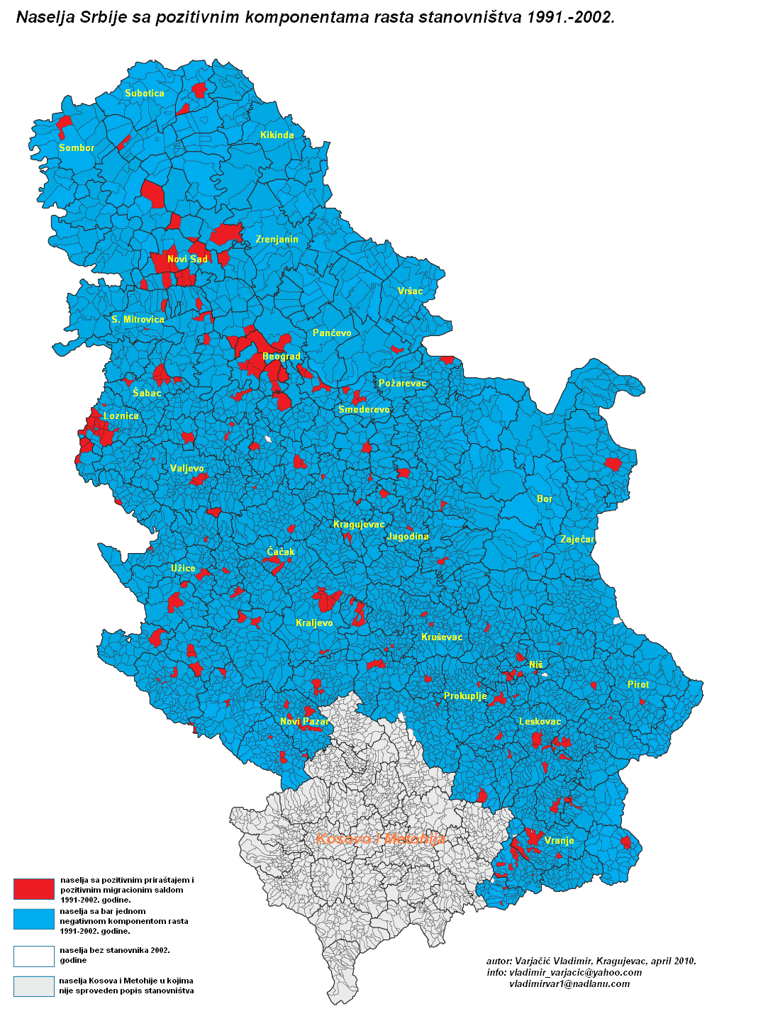 Насеља Србија са позитивним компонентама раста становништва 1991—2002.